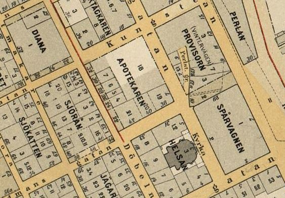 Del av Alfred Bentzers karta visande kvarteret Apotekaren med omgivning